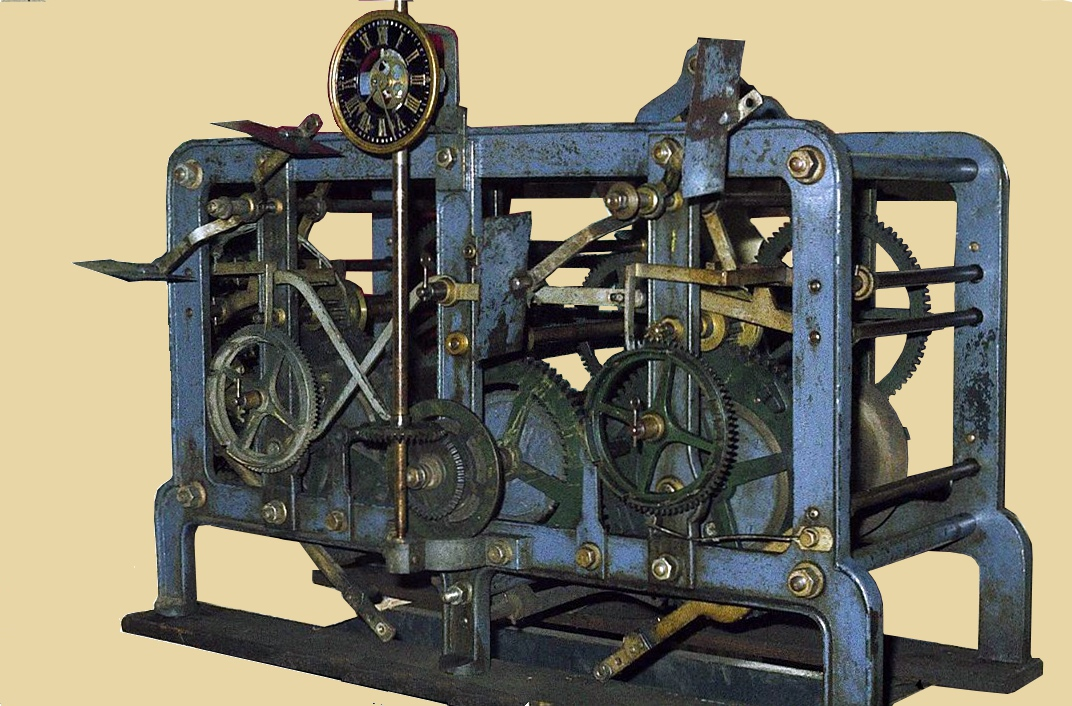 Turmuhrwerk aus der Pfarrkirche St. Mauritius Kärlich, 1906 von der Turmuhrenfabrik Heinrich Zilliken in Münstermaifeld hergestellt und 1907 eingebaut. Beim Weihnachtsbasar 1978 wurde das Uhrwerk verkauft, stand danach einige Zeit restauriert im Schaufenster eines Uhrmachers in der Löhrstraße in Koblenz, der es an einen Liebhaber weiterverkaufte. Der Verbleib ist unbekannt.